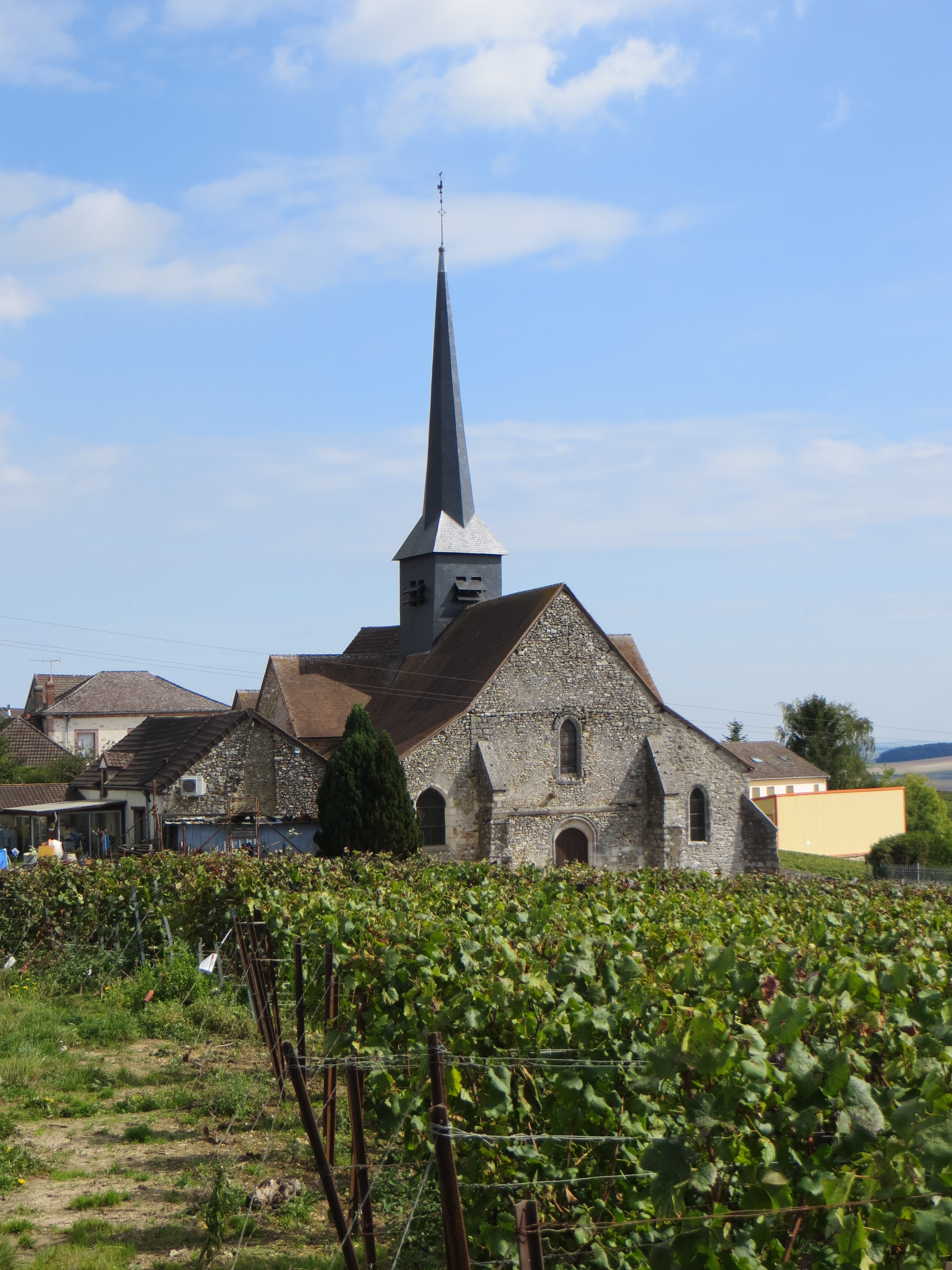 Vue générale de l'église